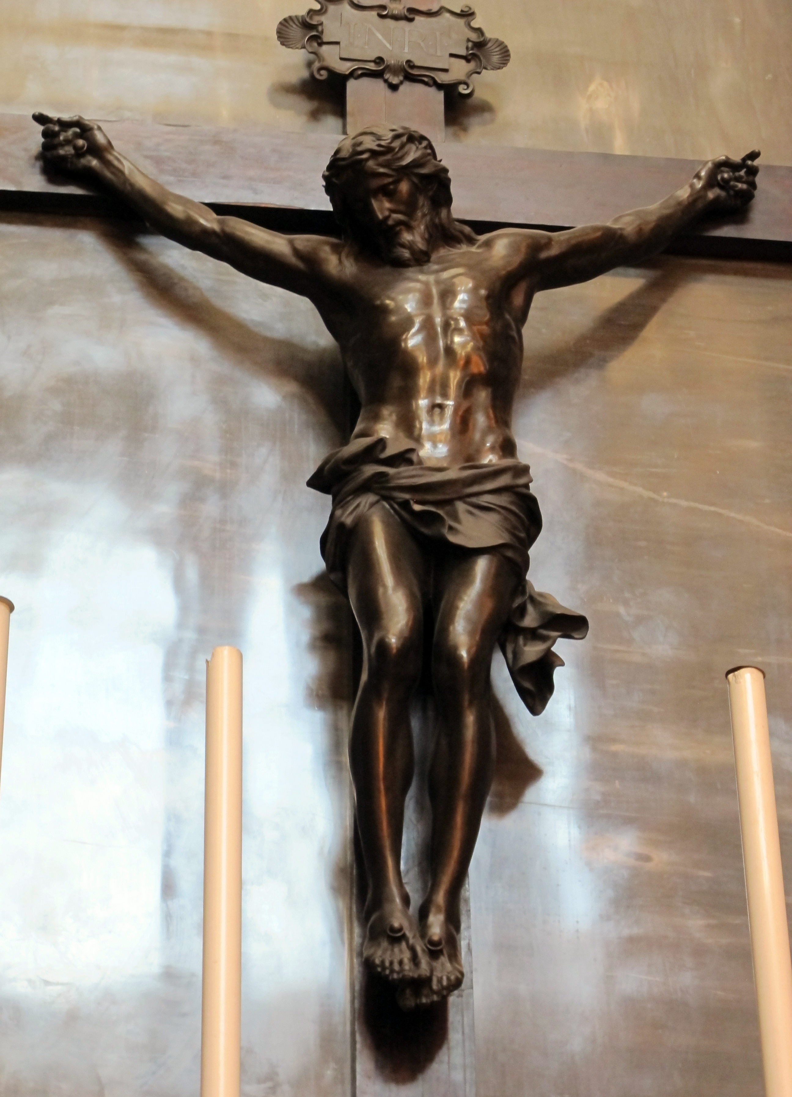 Santi Vittore e Carlo (Genova)